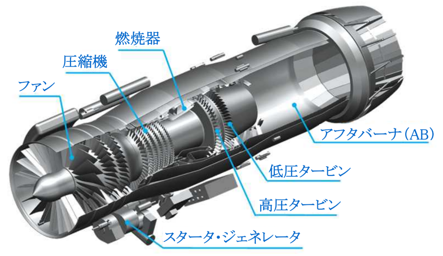 エンジン入口はファン３段、圧縮機６段で構成。